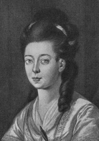 Herzogin Luise von Hessen-Darmstadt